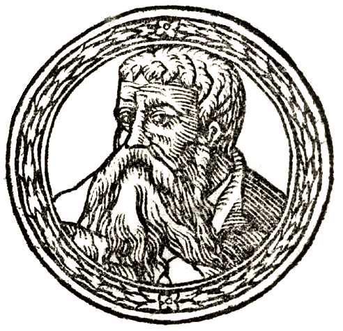 Vykintas, Duke of Samogitia